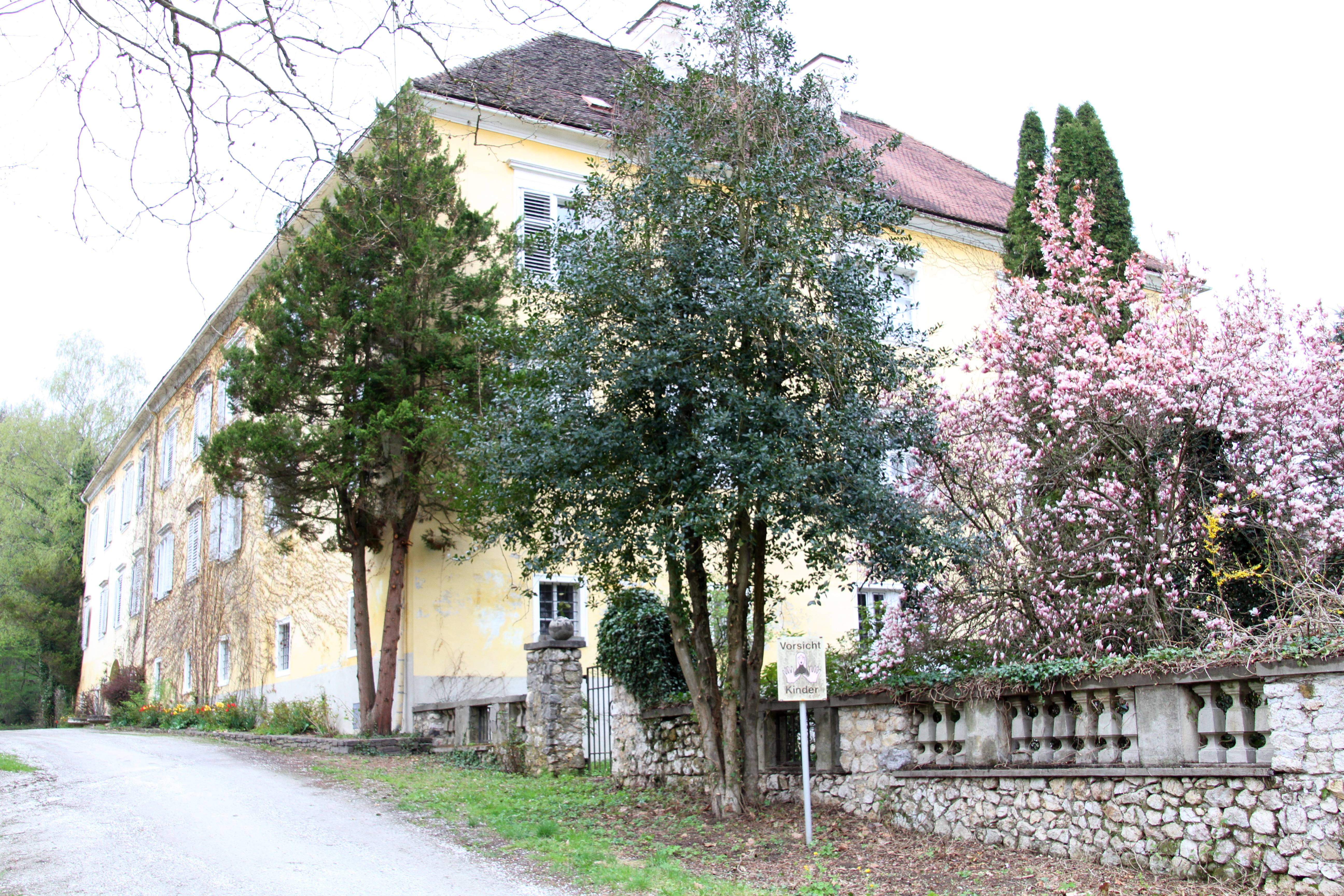 Schloss Schwarzenegg, Schwarzeneggweg 1, Weitendorf, Steiermark, Österreich